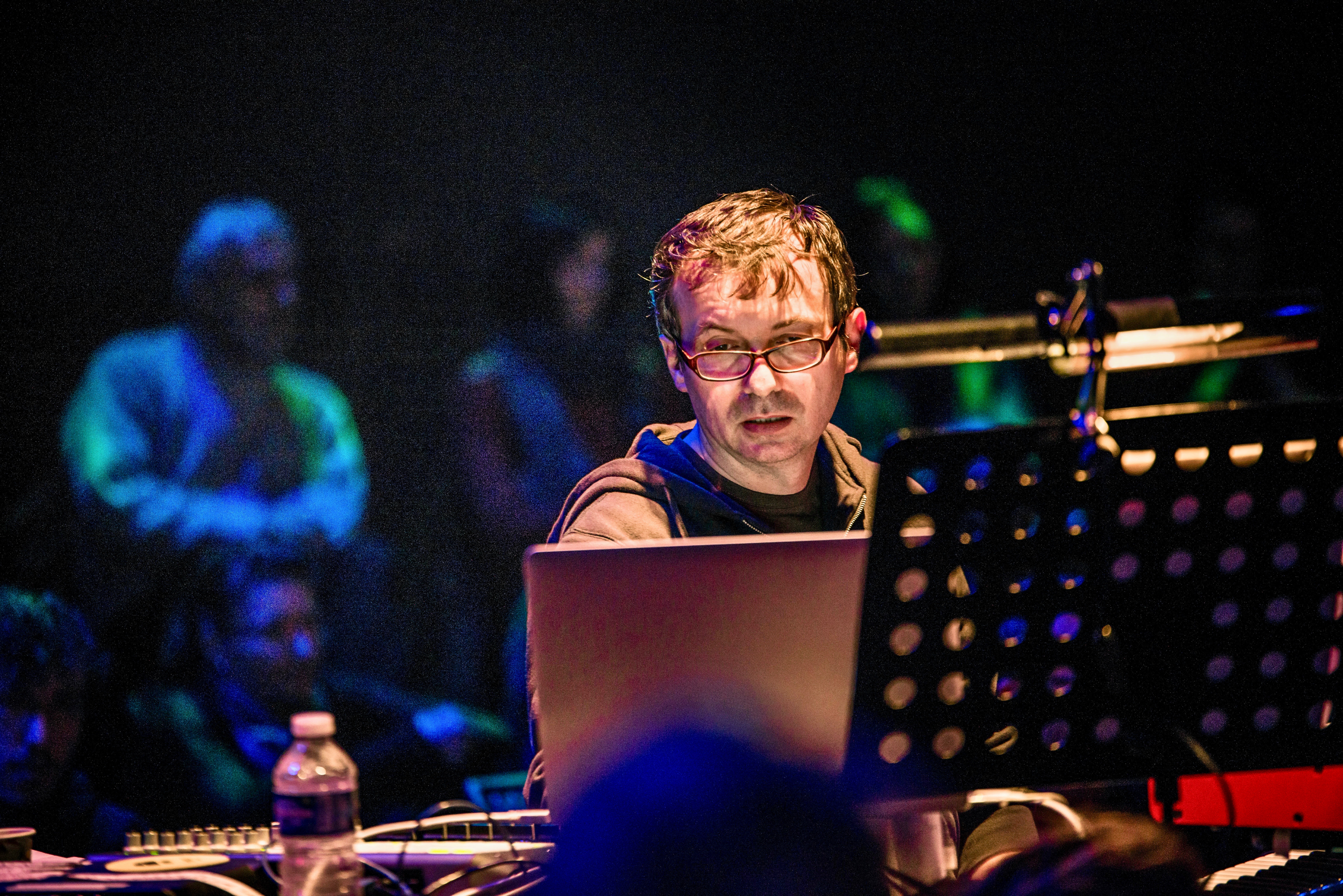 Marc Chalosse en concert à la Cité des Arts (avec Fawzy al Aiedy)